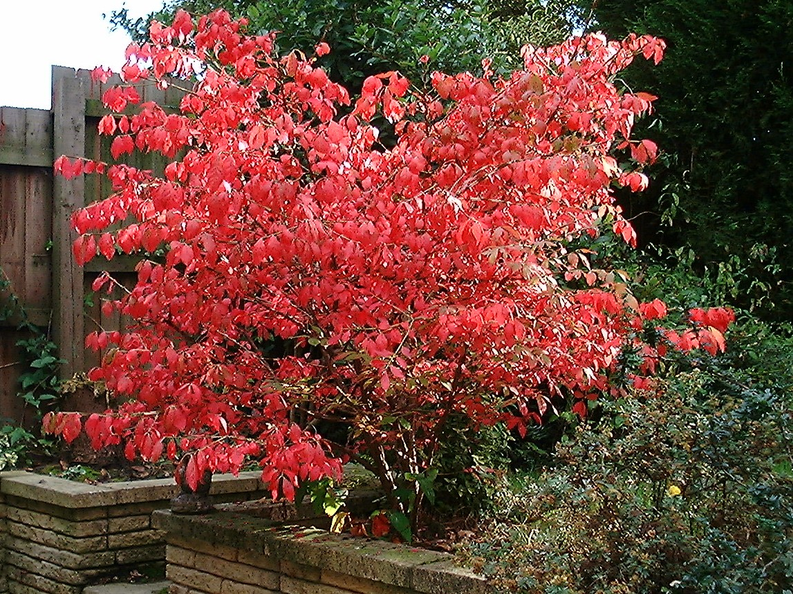 Euonymus alatus compactus in autumn colour